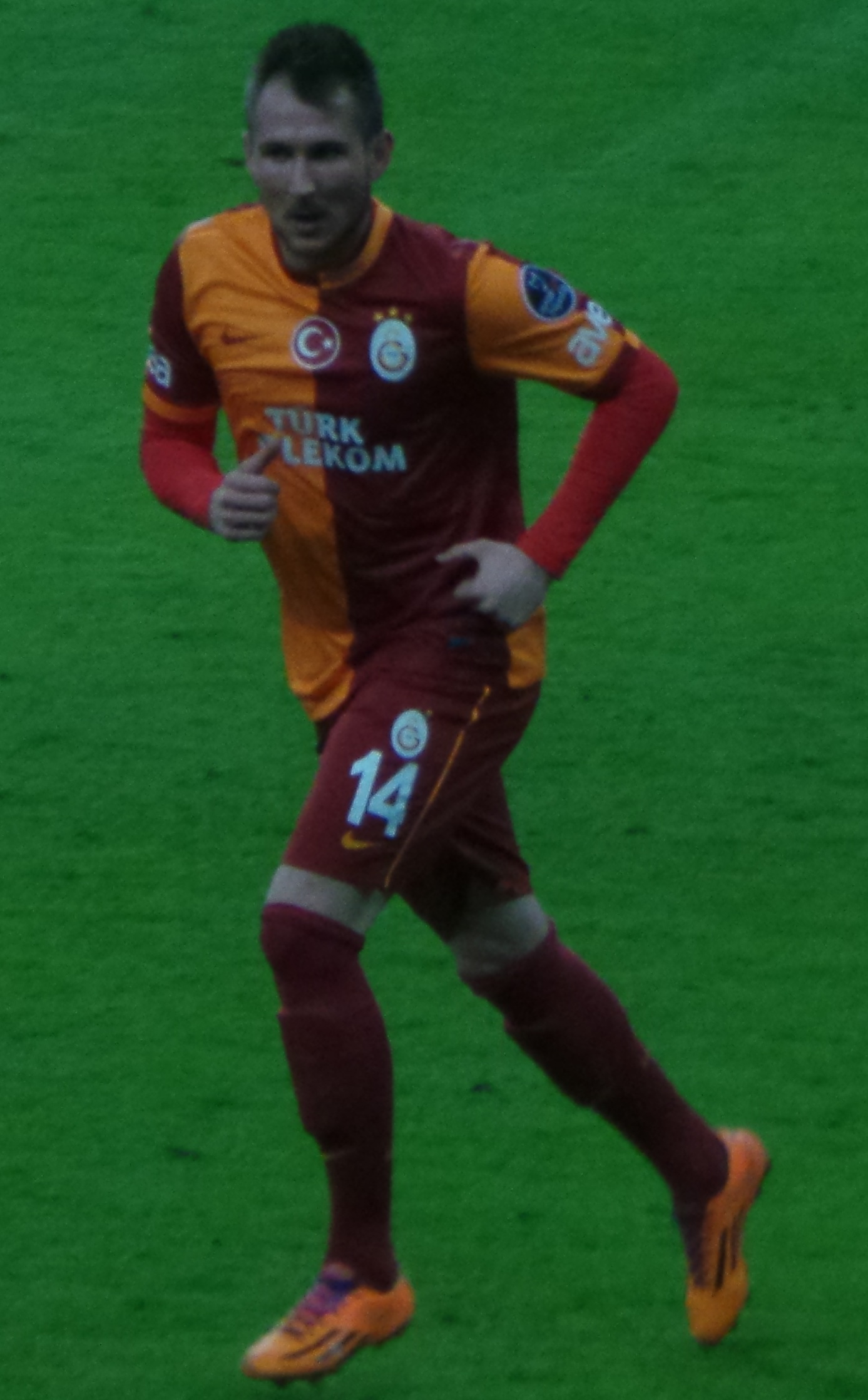 İzet Hajrovic vs Bursaspor